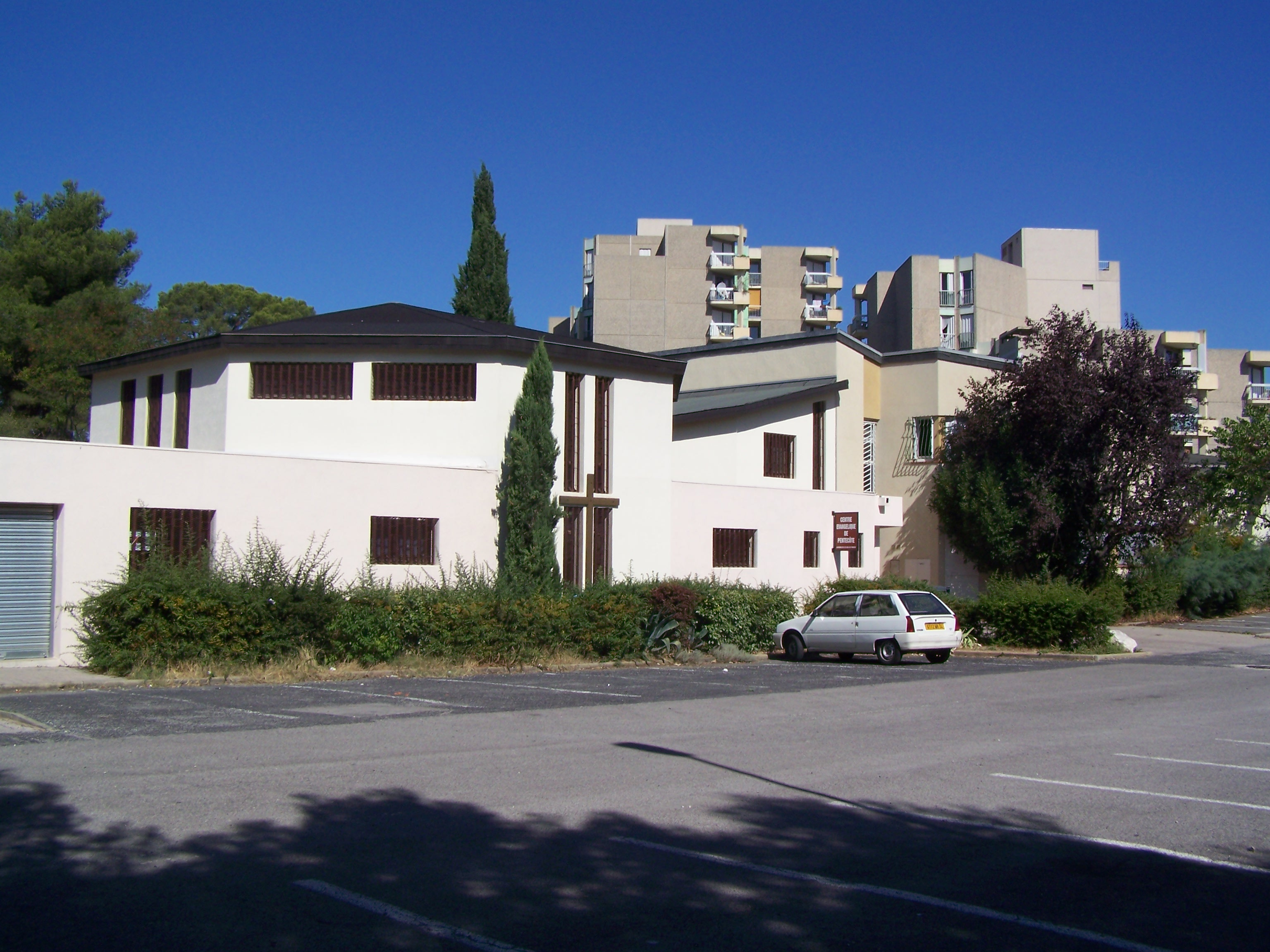 Église Évangélique dans le quartier de La Mosson à Montpellier (Hérault, Région Languedoc-Roussillon, France)